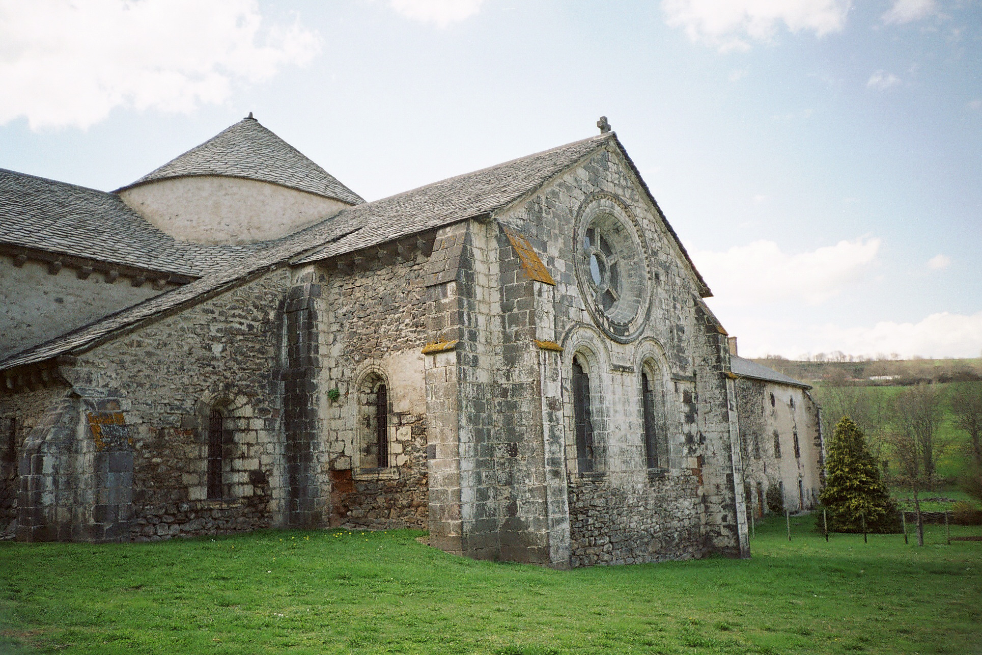 Abbaye de Mégemont